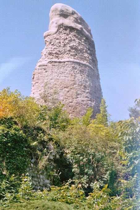 Alte Burg in Osterode/Harz